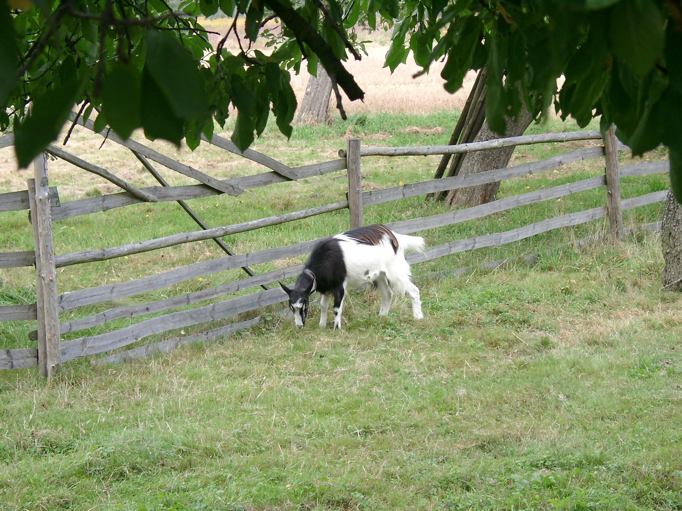 Koza A goat